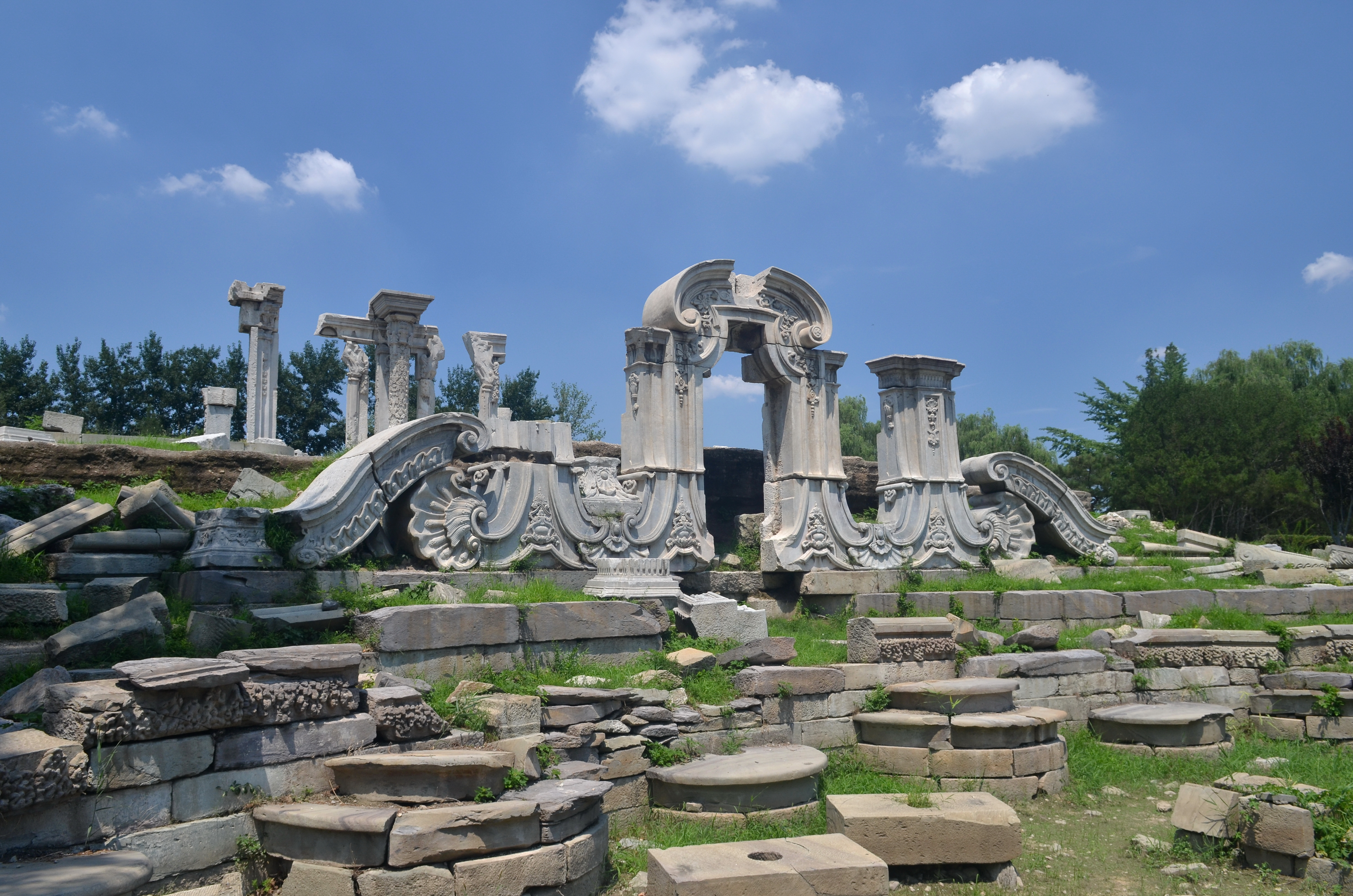 中文（中国大陆）: 西洋楼大水法、远瀛观残迹现状，在圆明园遗址公园。